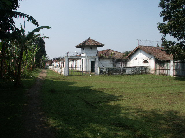 Tjimahi camp